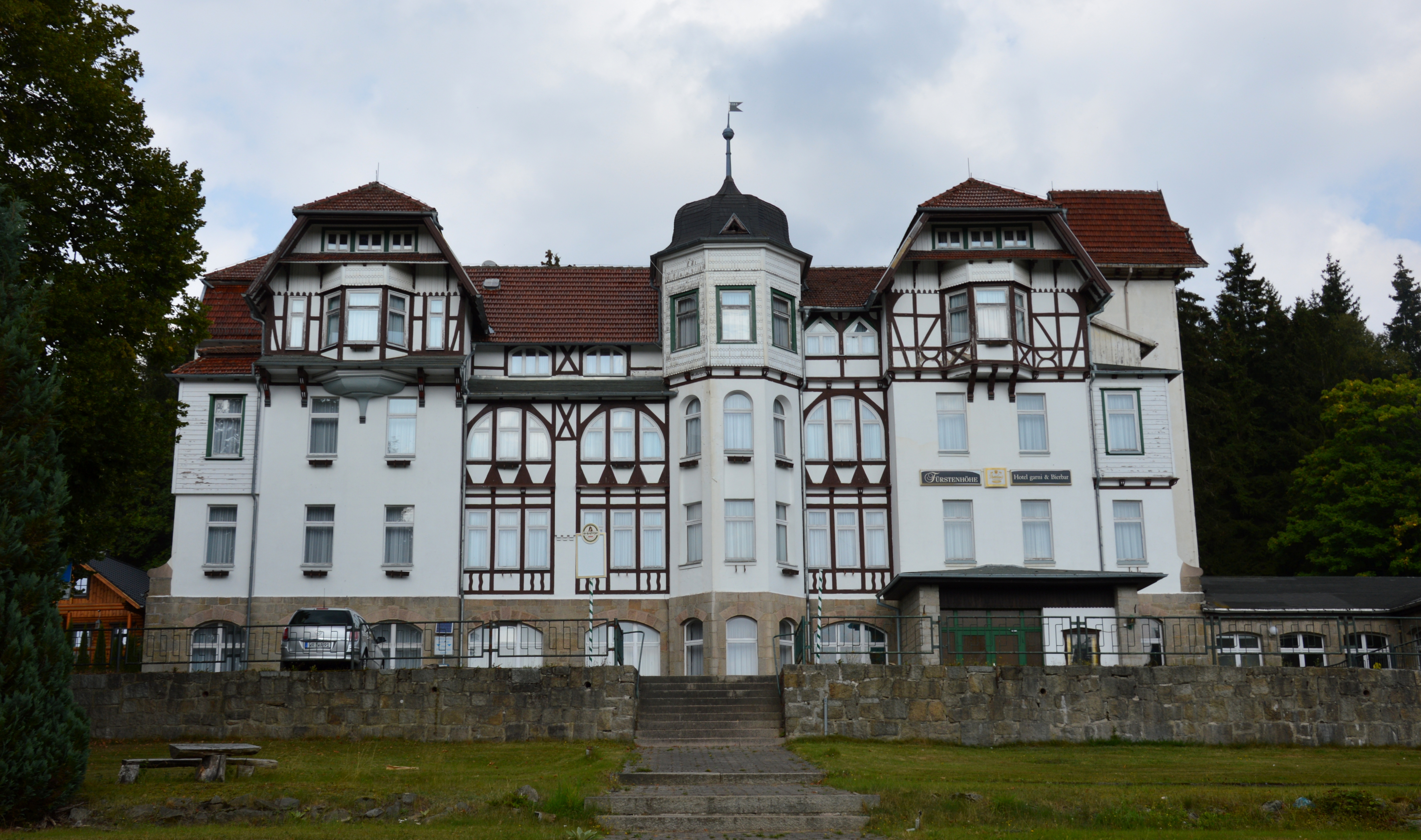 Hotel Fürstenhöhe Schierke